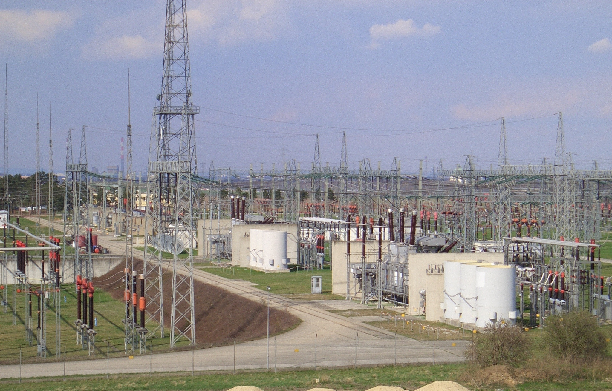 Umspannwerk Wien-Südost, die zwei Netzkuppeltransformatoren zwischen 380kv/220kV-Schaltfeld. Links und dahinter die vier Netzkuppeltransformatoren zwischen 220kV/110kV-Schaltfeld. Im Hintergrund der Schornstein vom Kraftwerk Simmering.